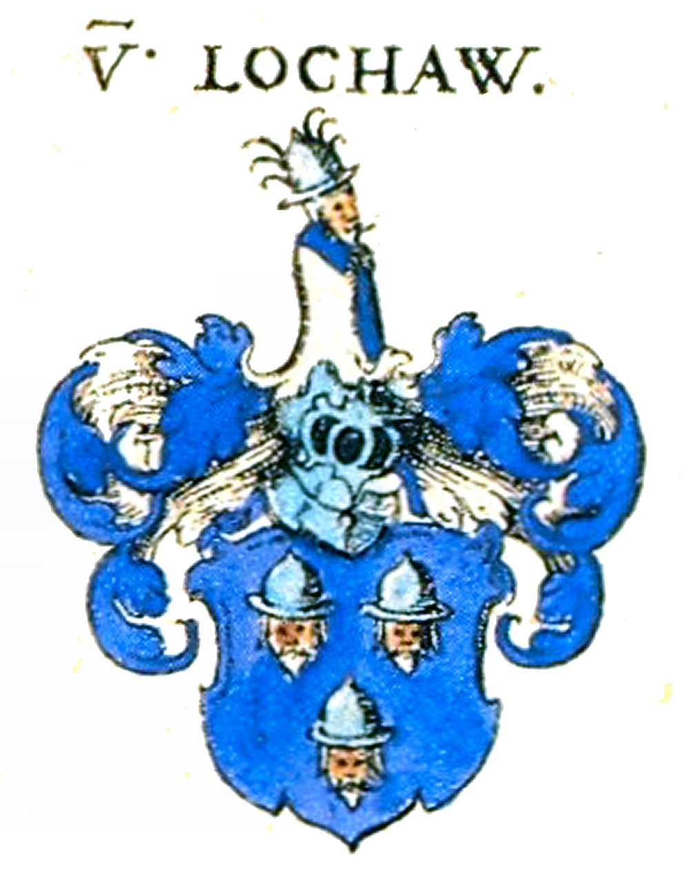 Wappen des märkischen Adelsgeschlechts Lochow